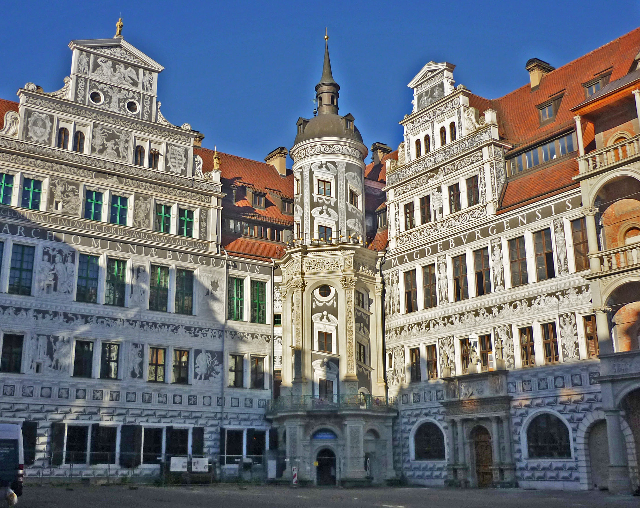 Residenzschloss Dresden, Großer Schlosshof, Nord- und Westfassade mit Wendelstein